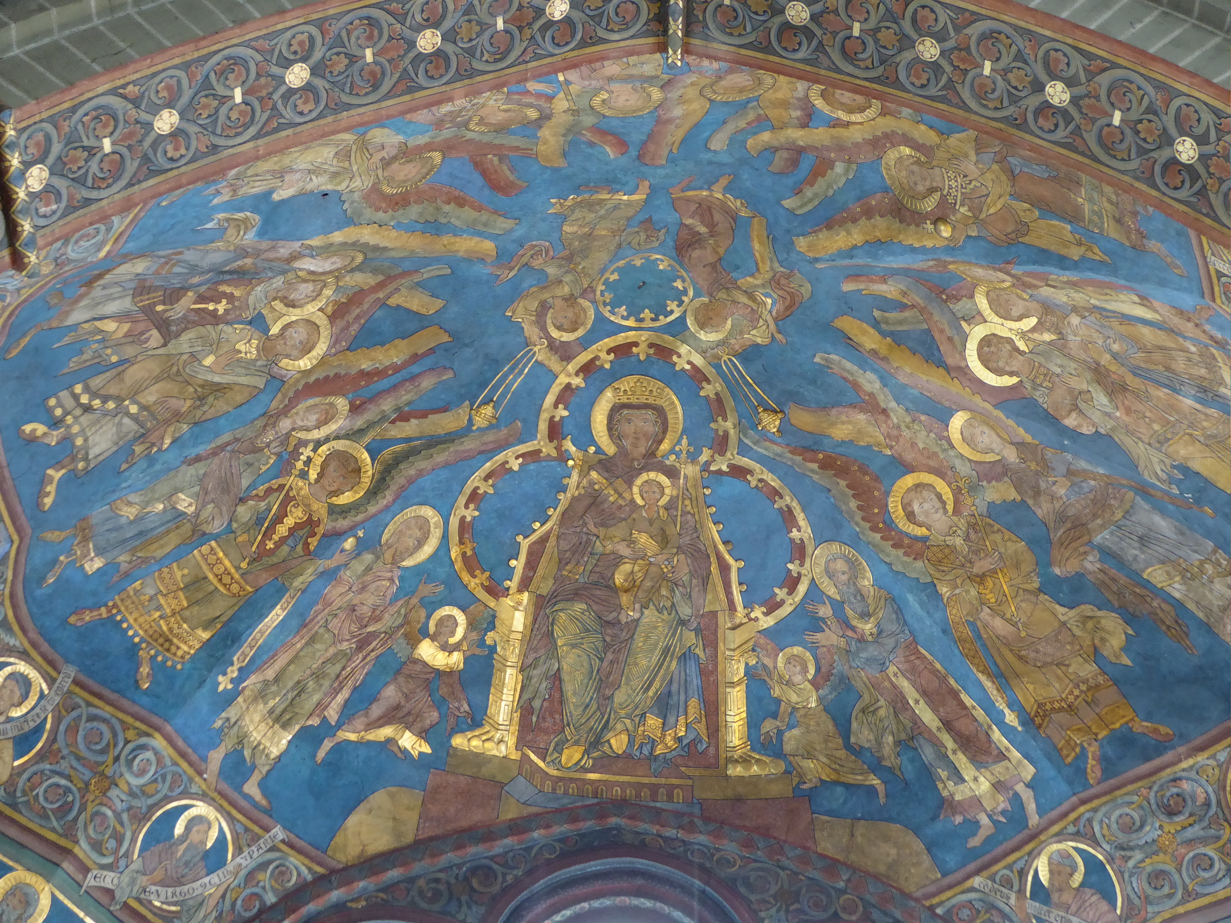 Soest, Maria zur Höhe, Deckengewölbe Altarraum